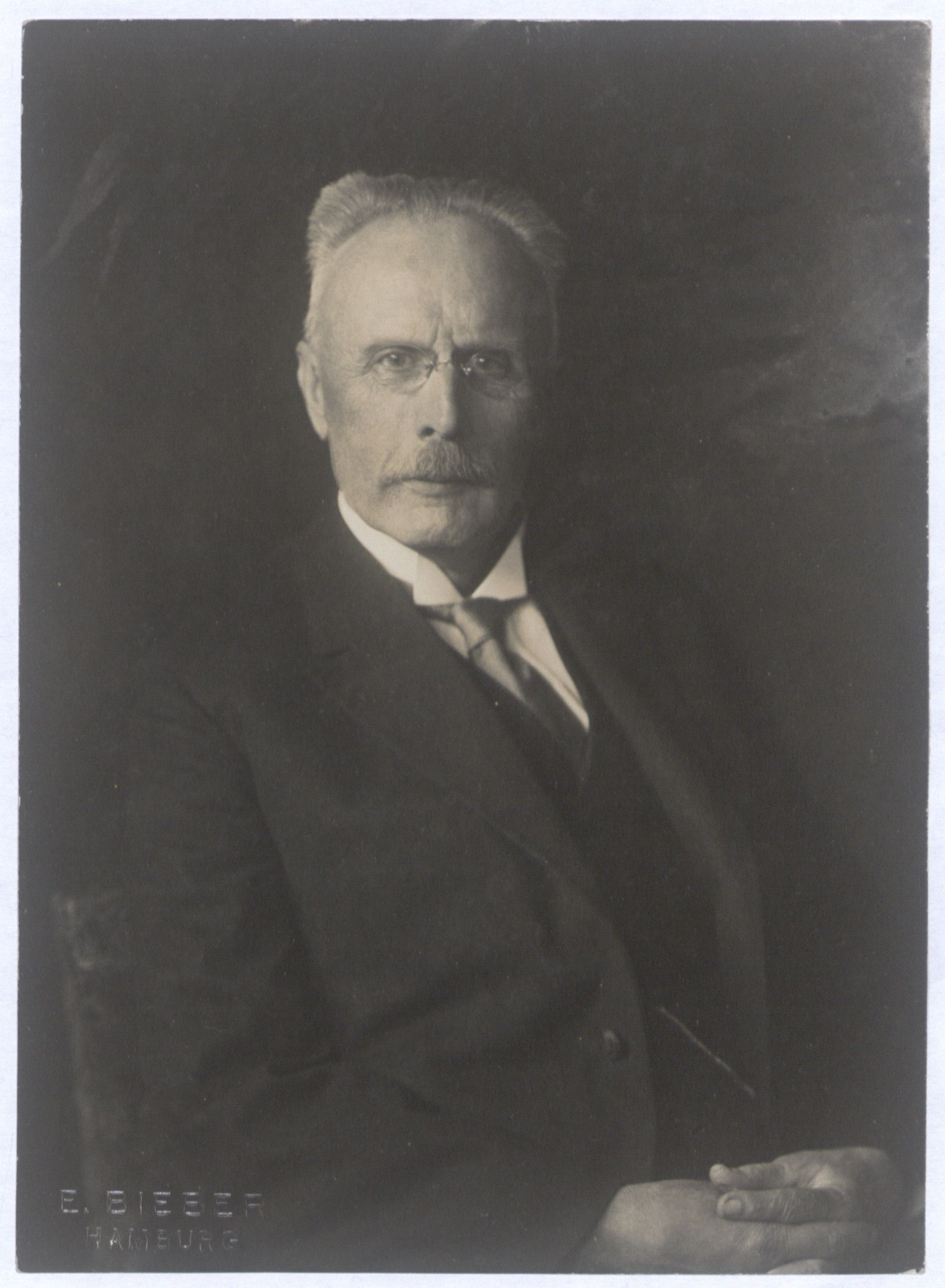 Porträtfotografie des Hamburger Navigationslehrers Friedrich Bolte